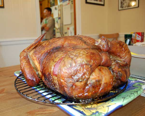 A well roasted Turducken looks just like a Turkey